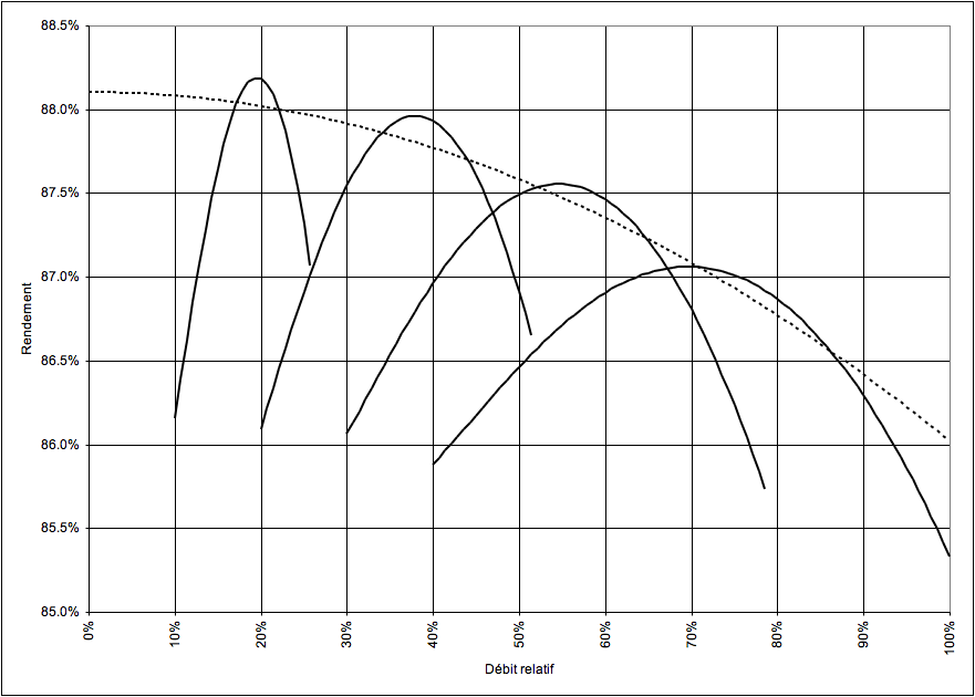 Collines de rendement d'un ouvrage de production hydroélectrique (4 groupes)